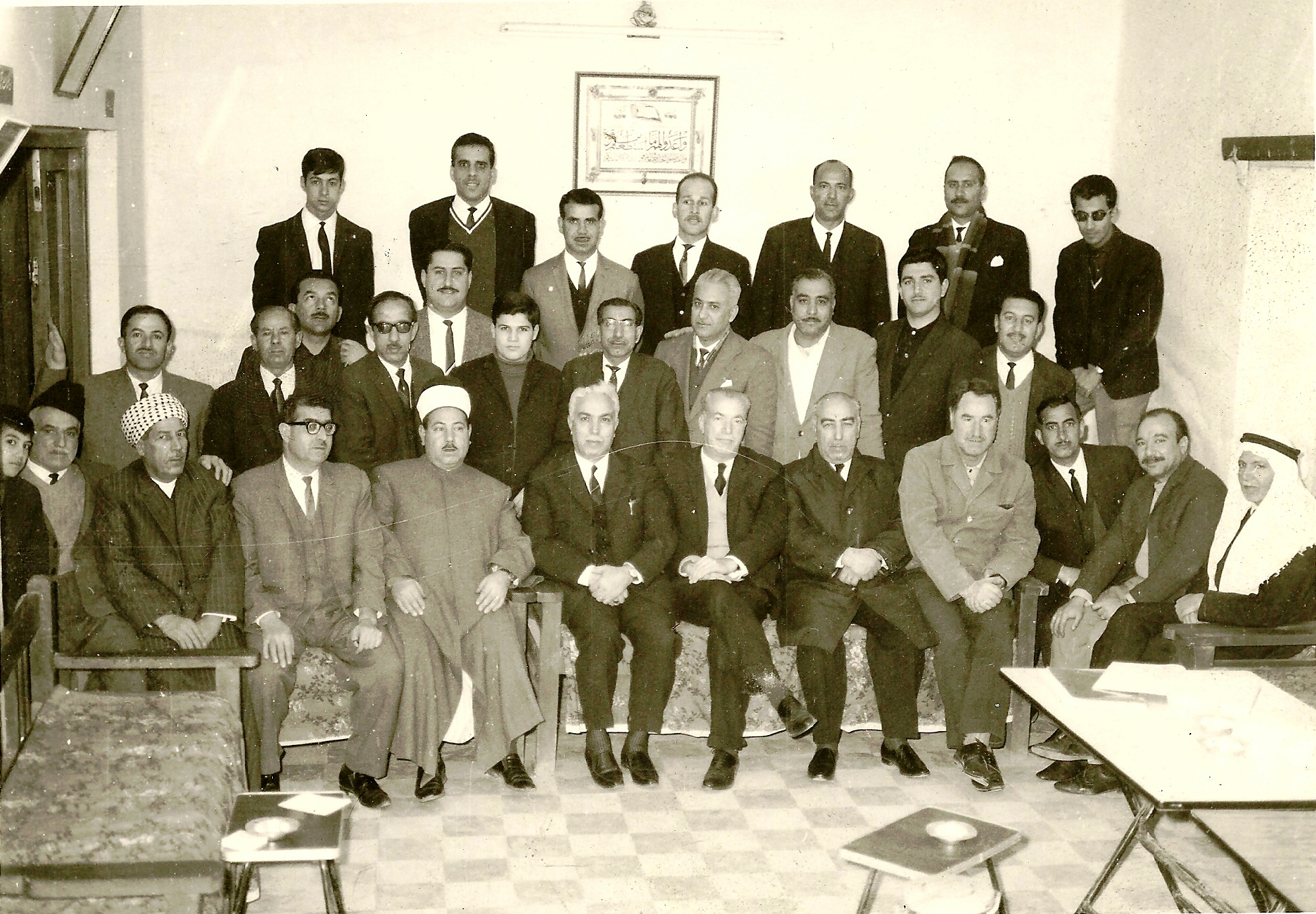 الأعضاء المؤسسين لجمعية ومنتدى الامام الأعظم أبي حنيفة بداية الستينات ومنهم: 1- في الصف الخلفي : الأول على اليمين وقوفاً (صباح رشيد شلال) والثاني الأستاذ الشاعر (وليد الأعظمي) والثالث (ابراهيم البلوة) والخامس الدكتور (مصطفى سعيد خميس الأعظمي) والسادس الدكتور (رشيد العبيدي) والسابع (أحمد الشهابي) 2- صف الوسط: الثالث من اليمين (عبد الملك بيت عباس السمين) والرابع مؤذن جامع الإمام الأعظم (محمد علي - أبو فؤاد)، والخامس (أبو عوض الحلاق من بيت المزاينة)، و السادس (قيس حكومي)، والسابع الدكتور (محمد محروس المدرس)، 3- الصف الأمامي (الجالسون): الأول من اليمين (إبراهيم الكتبي والد الحاج مؤيد) والثالث (عبد الباقي جاسم شقيق نصيف الحلاق) والرابع (نوري الأعظمي) والثامن (مله حسين) والتاسع (إبراهيم الأجدع) والعاشر (رشيد شلال) والحادي عشر ( ناجي ملا ياس العبيدي الاعظمي)، والثاني عشر الصبي قُصي حكومي